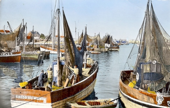 Bateaux de pêche dans le port du Guilvinec vers 1925